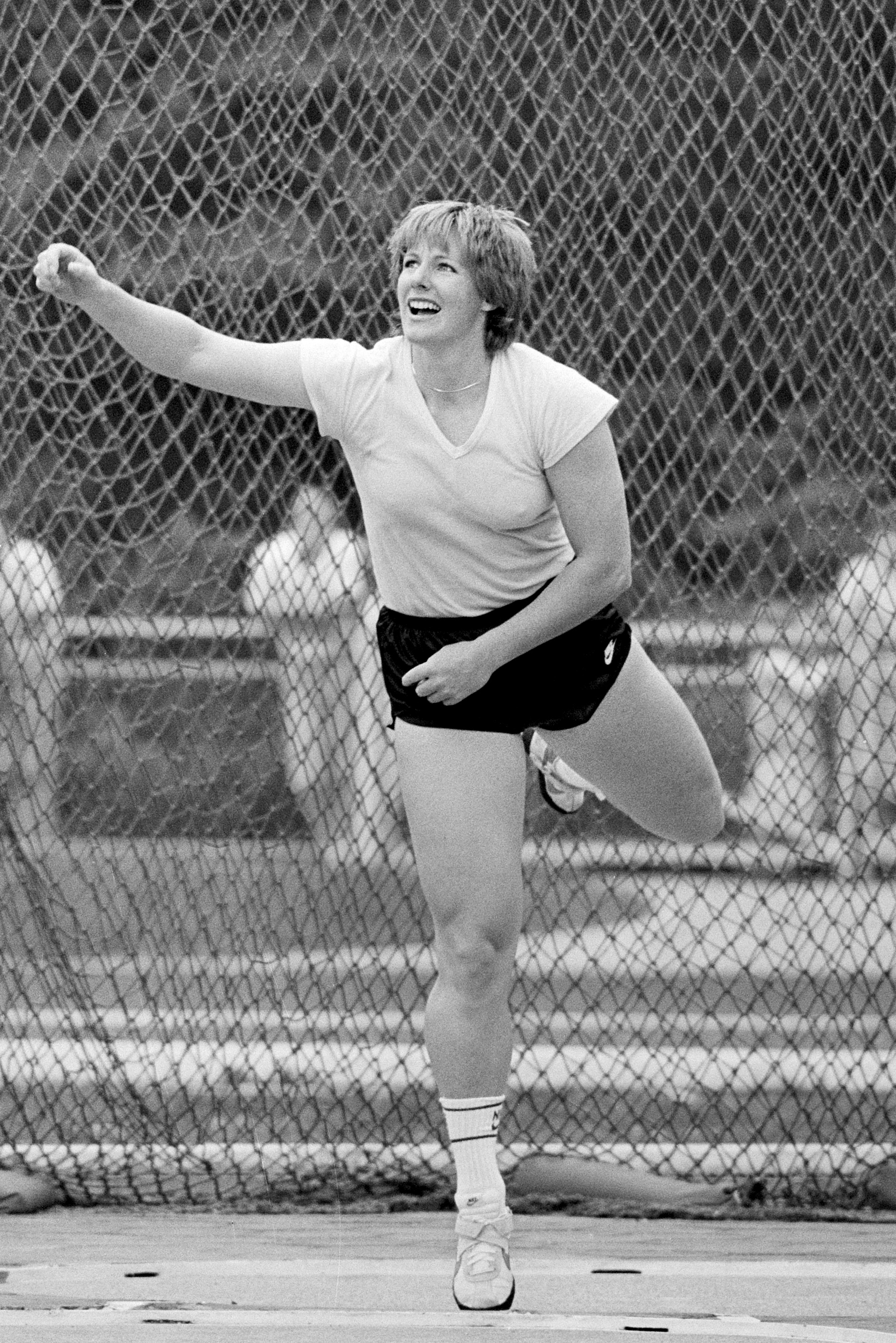 Nederlandse kampioenschappen atletiek in Amsterdam; winnares discuswerpen Ria Stalman in aktie